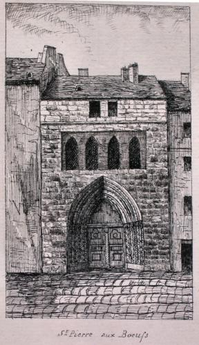 église St-Pierre aux Boeufs dessin de Chapelle 1850-1925